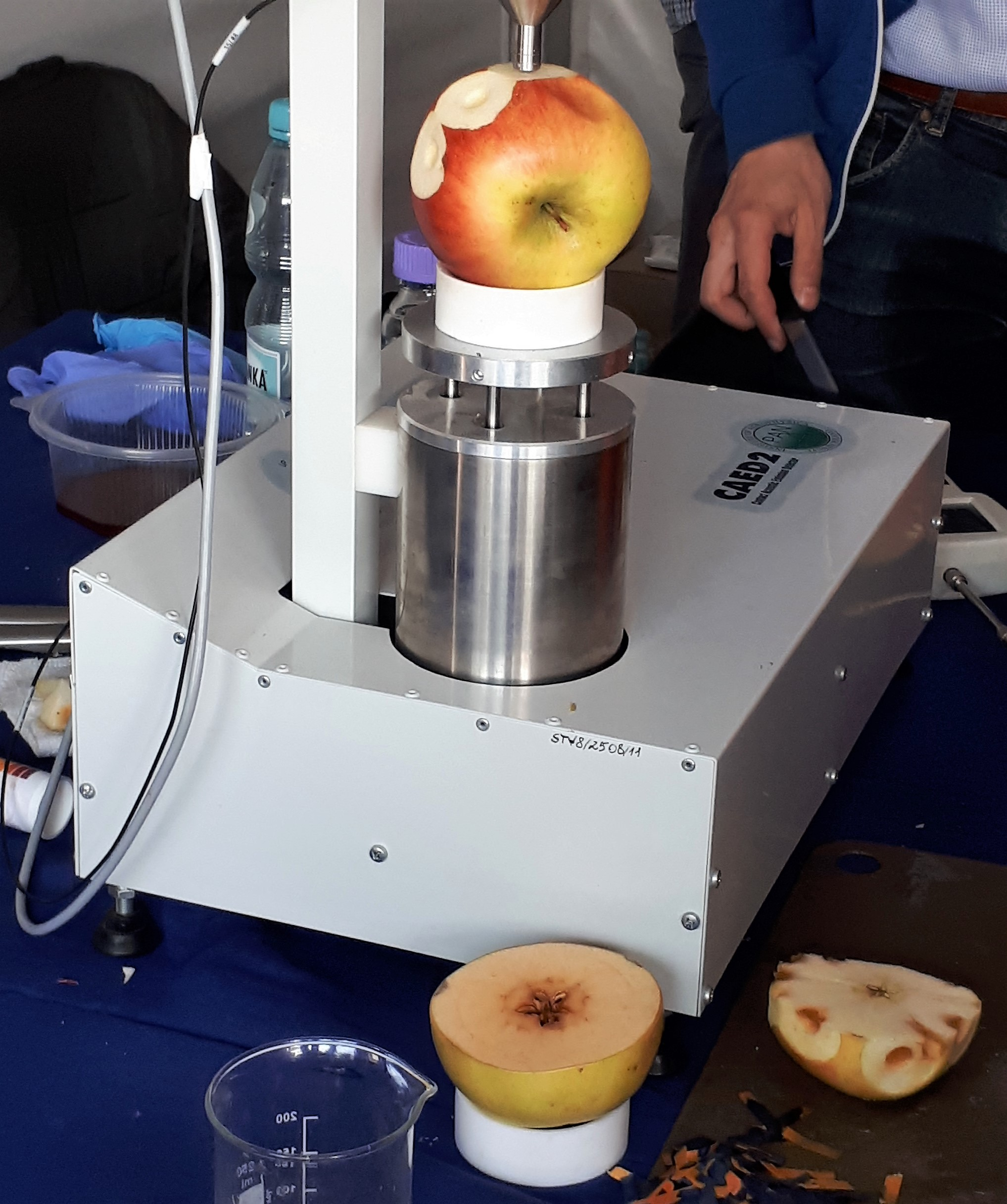 Robot-smakosz.Namiot Instytutu Agrofizyki PAN. Centrum Nauki Kopernik, Polskie Radio - 23. Piknik Naukowy 2019